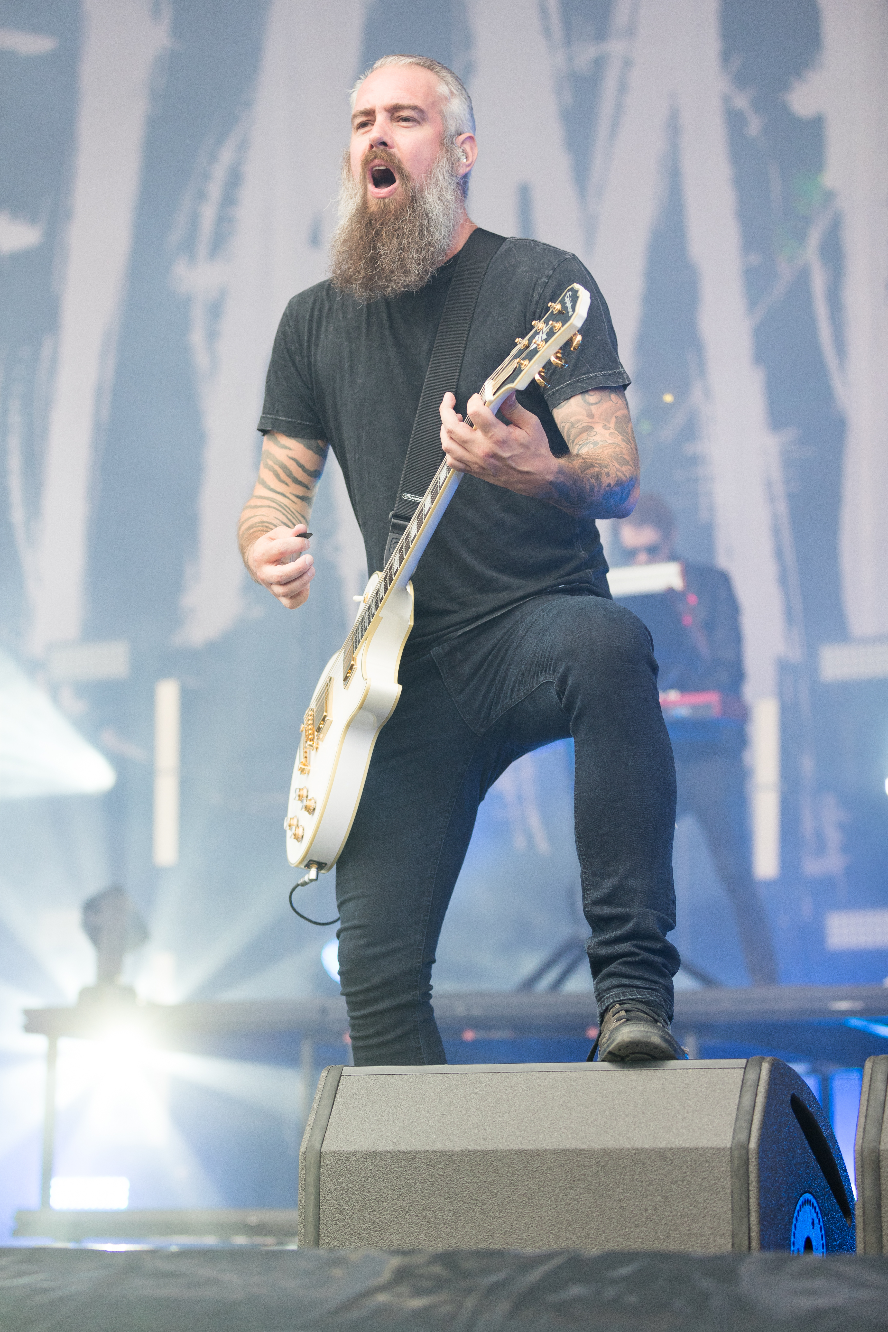 In Flames during Rock am Ring at Nürburgring, Nürnburg, Rheinland Pfalz, Germany on 2017-06-02, Photo: Sven Mandel